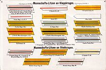 litze 1910 à 1915